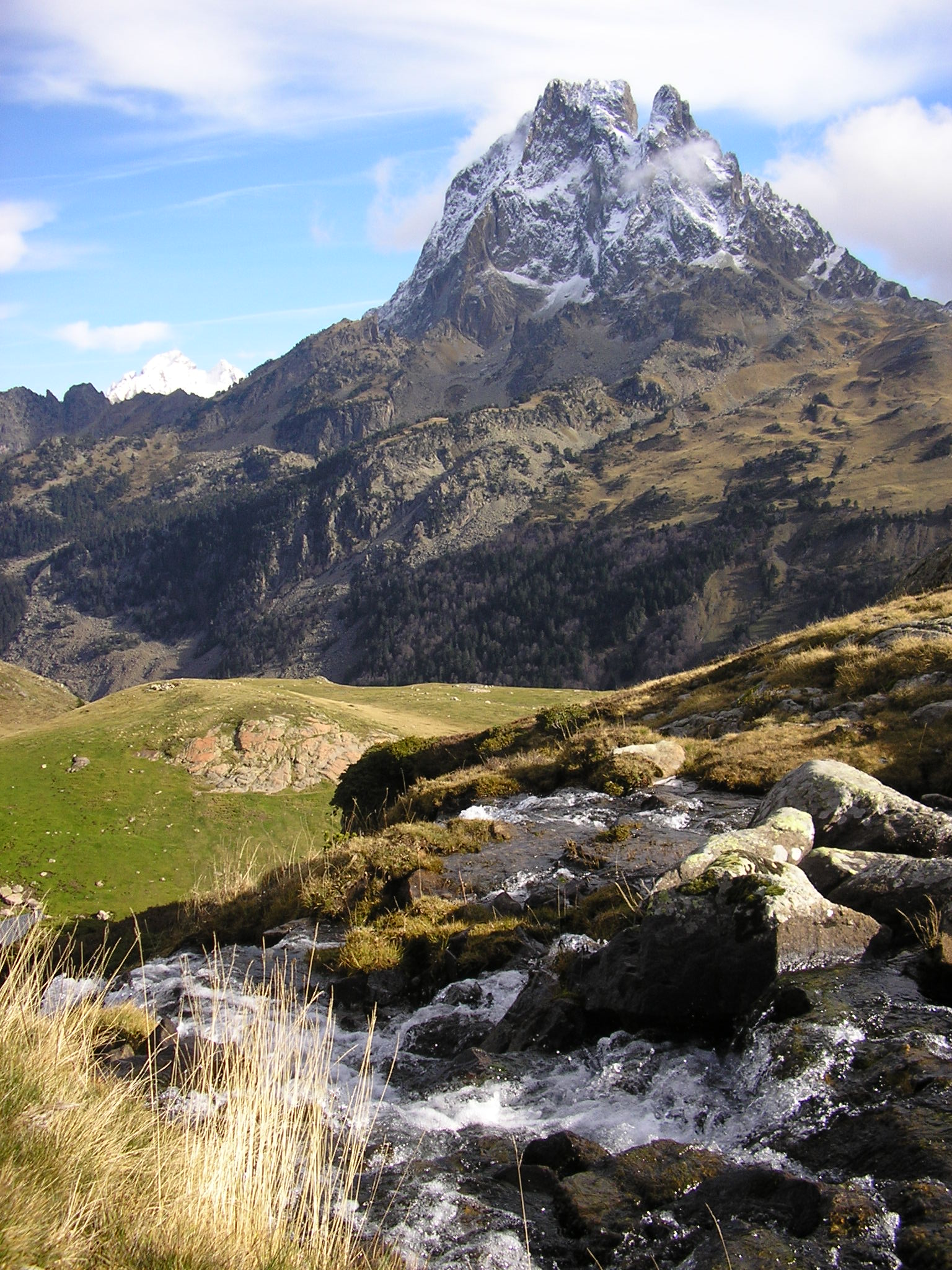 Pic du Midi d'Ossau, 2884m, Pyrenees, France